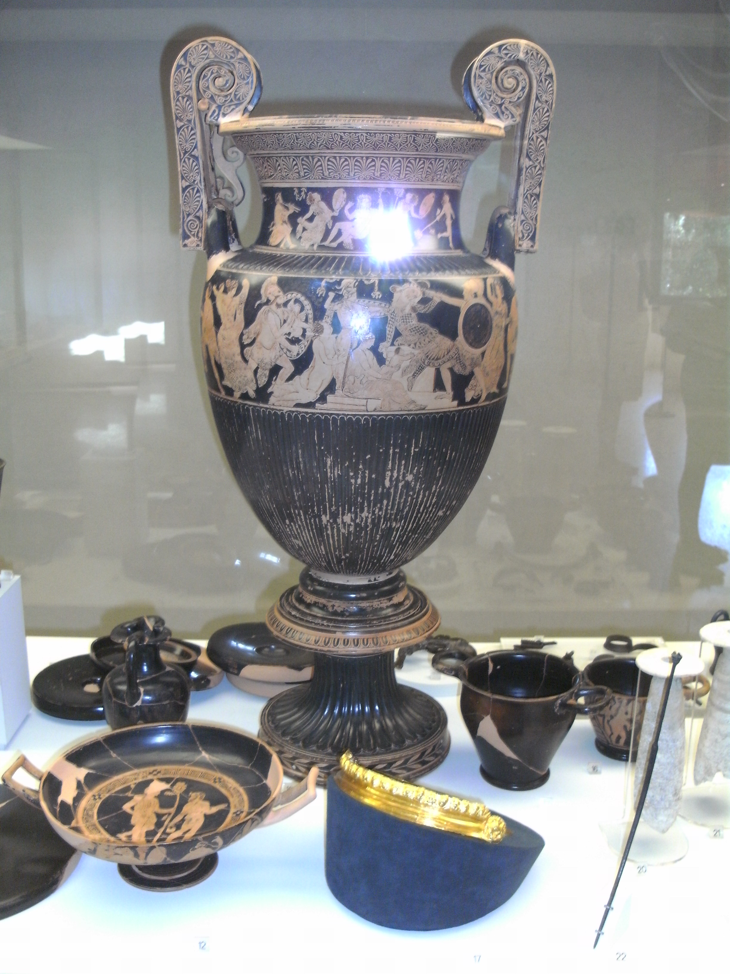 Grabbeilagen eines bei der antiken Stadt Spina ausgegrabenen Etruskergrabes. eigene Aufnahme (aus einer Vitrine im Archäologischen Nationalmuseum von Ferrara, Italien)